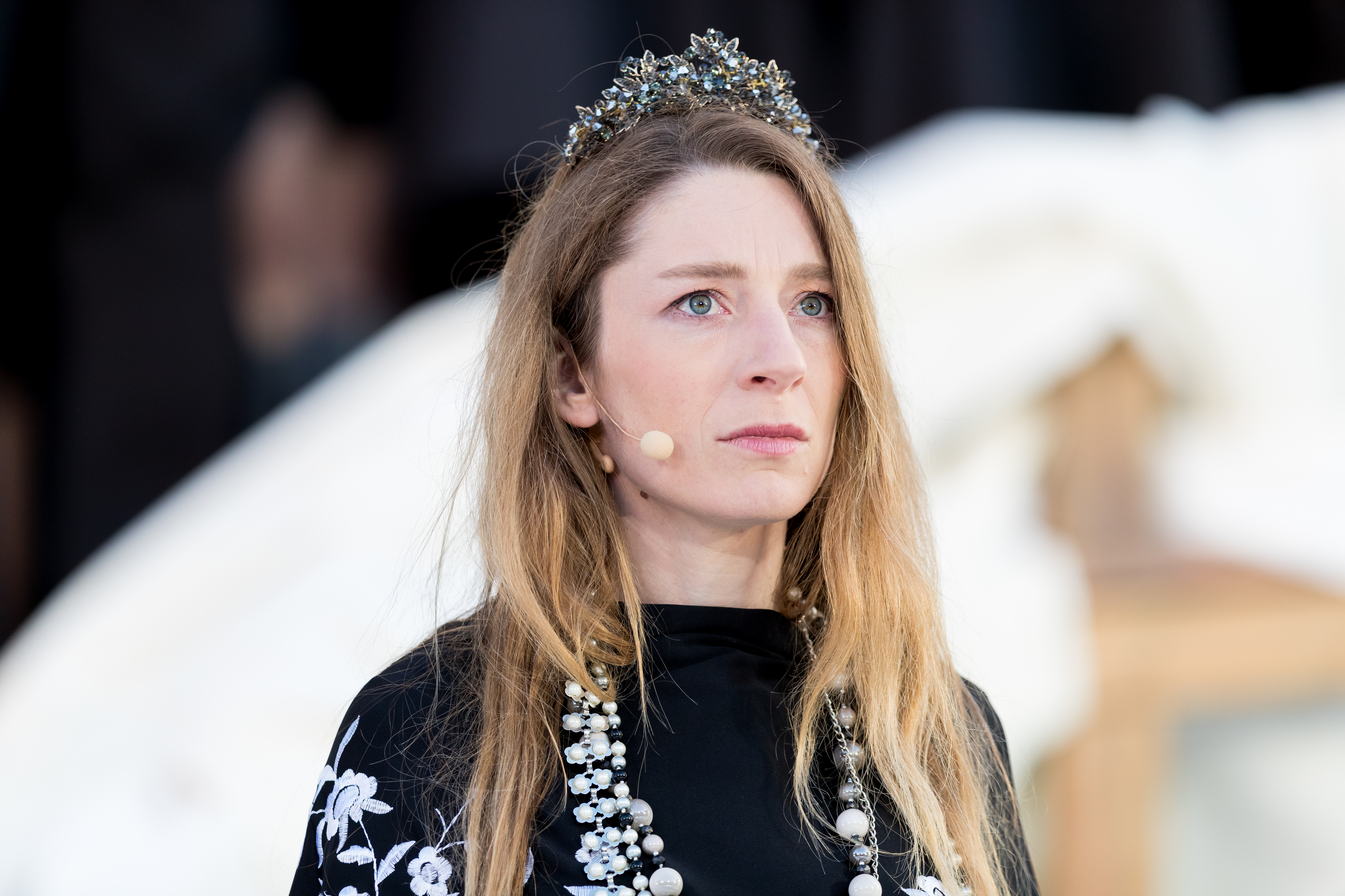 Kathleen Morgeneyer during Nibelungenfestspiele ( at Worms, Rheinland-Pfalz, Germany on 2019-07-10, Photo: Sven Mandel